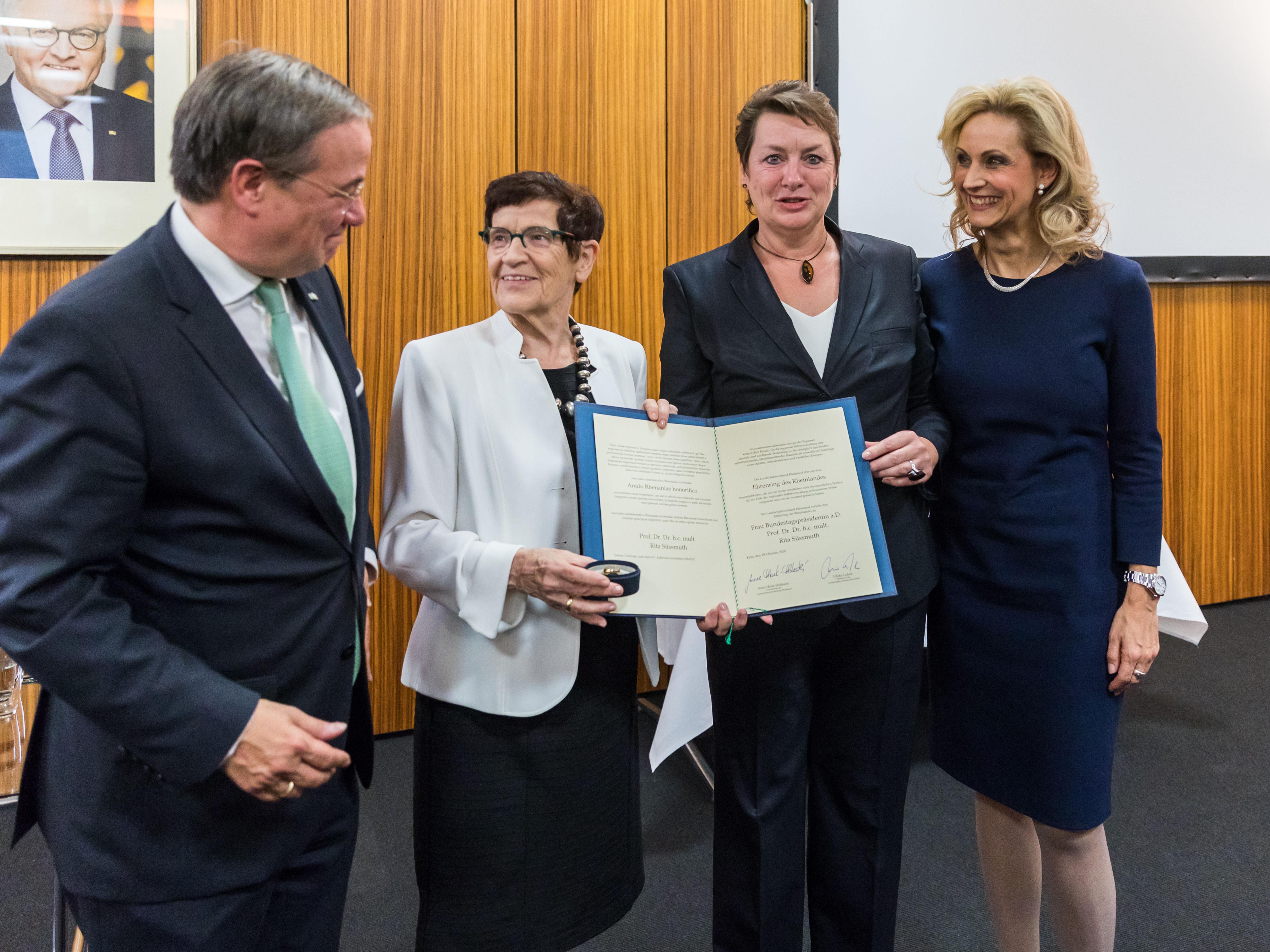 Verleihung des Ehrenring des Rheinlandes durch den Landschaftsverband Rheinland (LVR) an die Bundestagspräsidentin a.D. Rita Süssmuth Foto von links nach rechts: Armin Laschet (Ministerpräsident von Nordrhein-Westfalen), Rita Süssmuth, Anne Henk-Hollstein (Vorsitzende der Landschaftsversammlung Rheinland) und Ulrike Lubek (Direktorin des Landschaftsverbandes Rheinland)